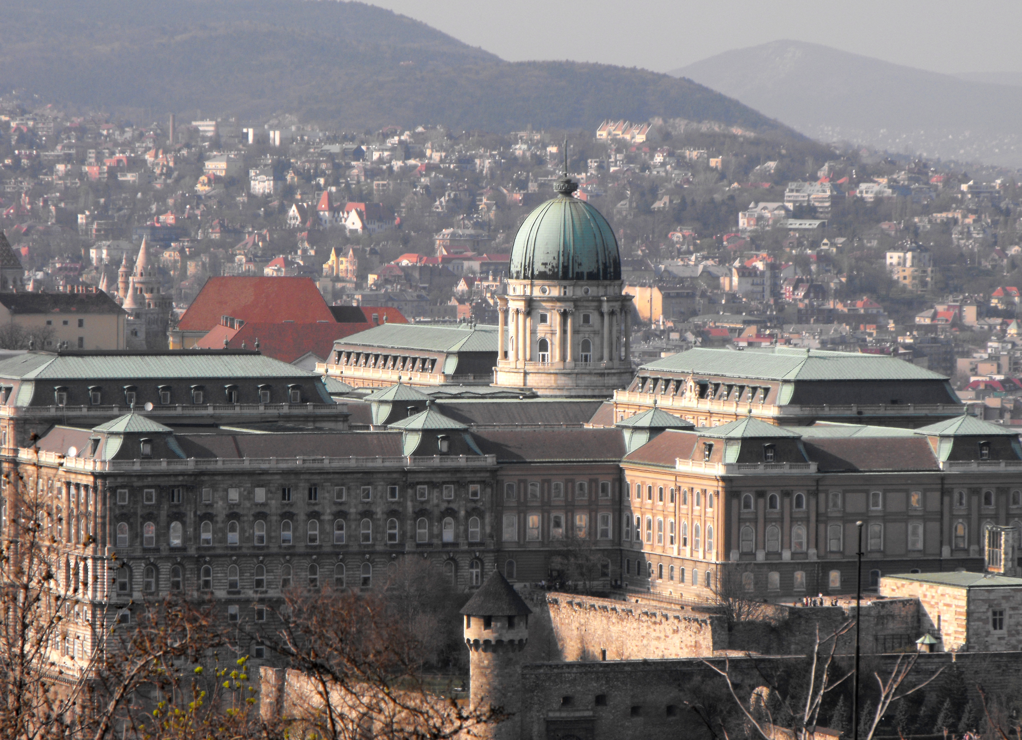 A Budai vár a Gellért-hegyről.